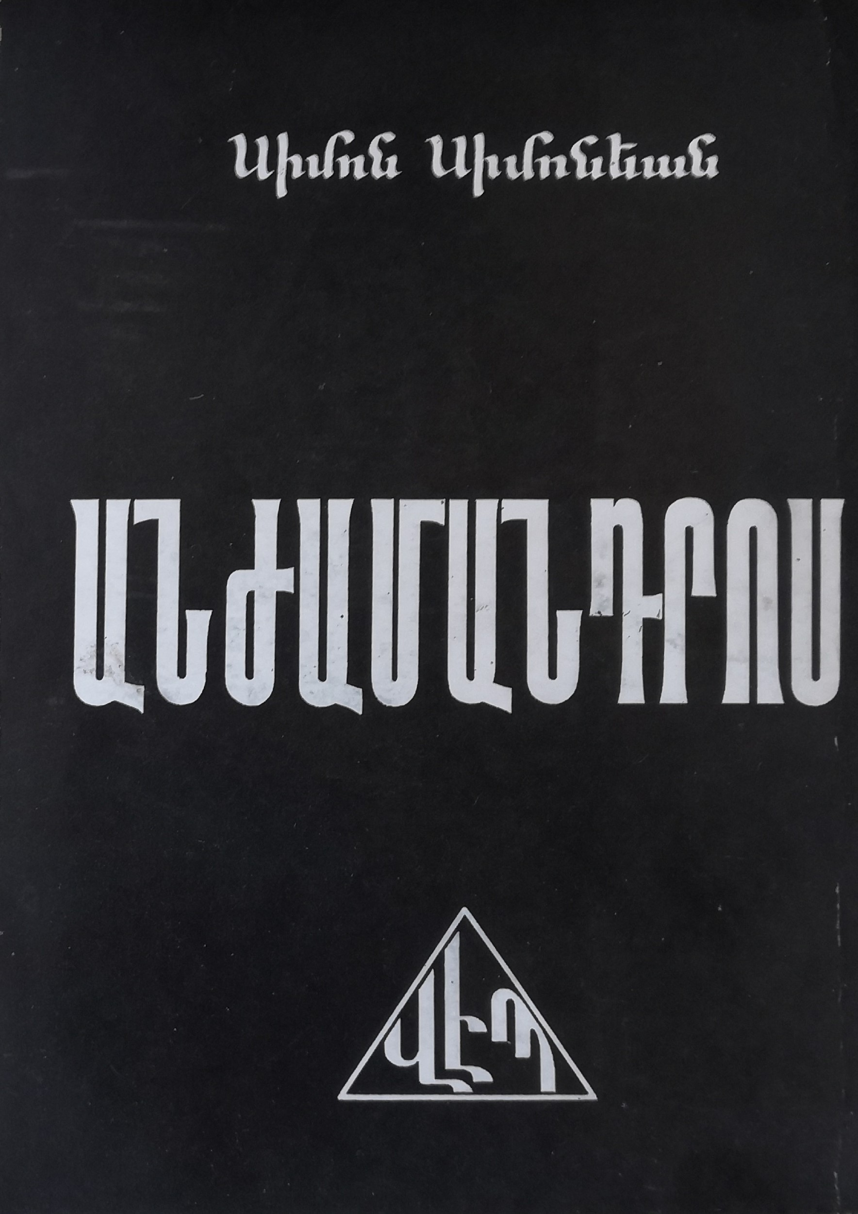 Գրքի շապիկը